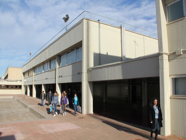 Polo Liceale di Monopoli, in via San Marco.